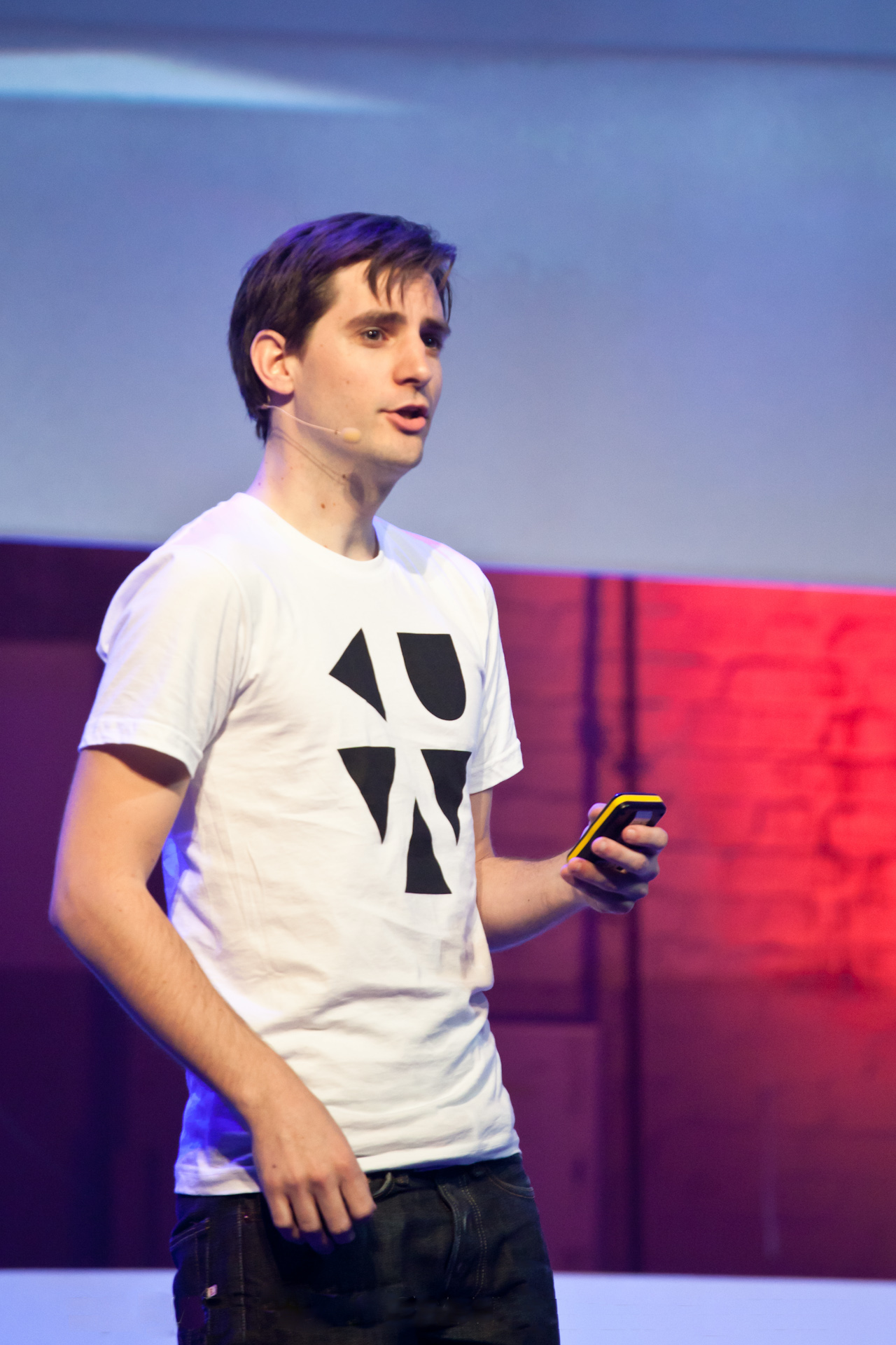 TNW2011